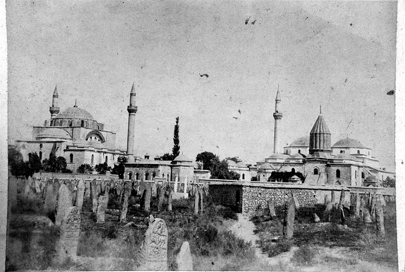 Konya'da Üçler Mezarlığı. Arkada Mevlana Türbesi ve Sultan Selim Cami